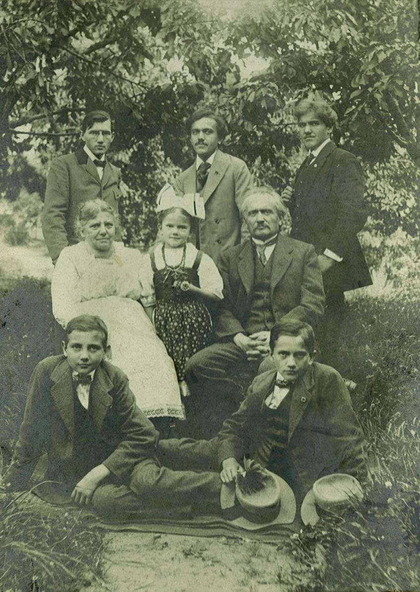 Otakar Březina se svou rodinou